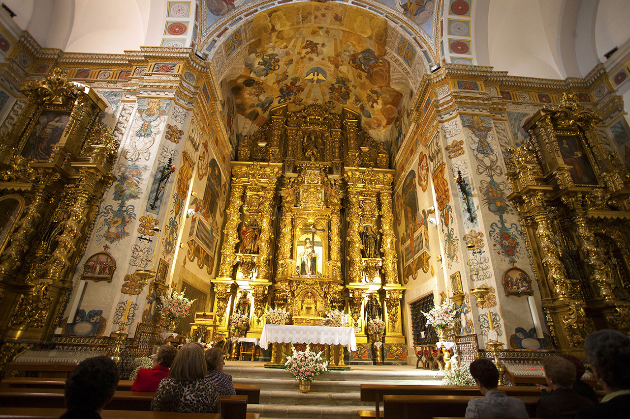 Santuario del Cristo